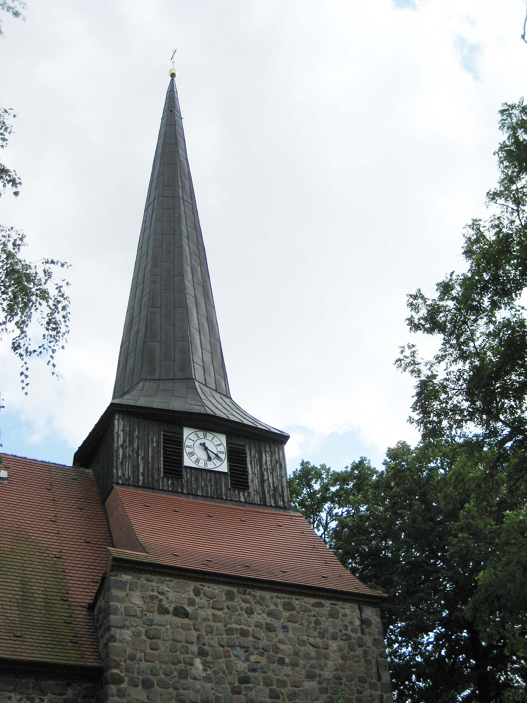 Die Kirchturmspitze der Kirche Zerrenthin.